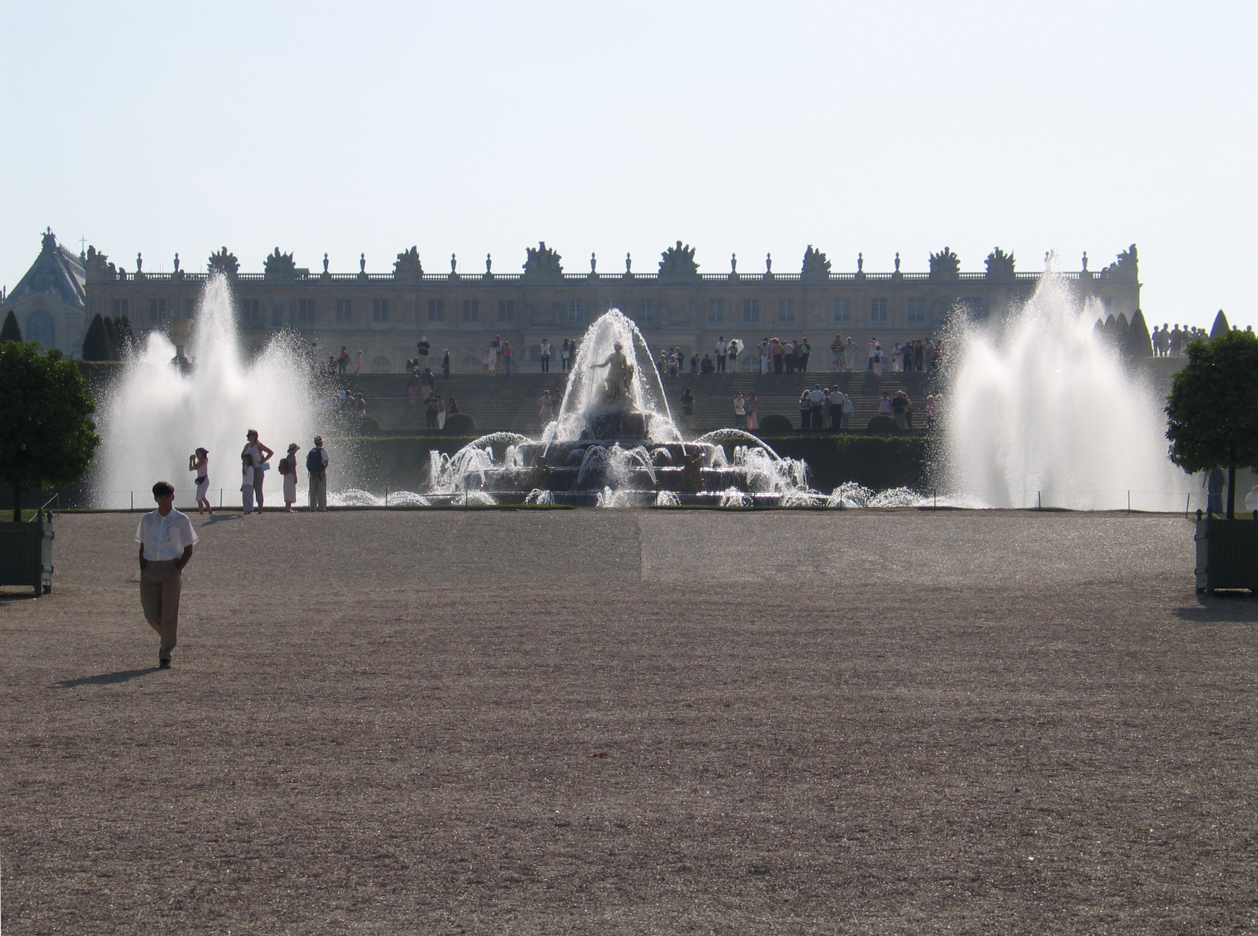 Wasserspiel in Der Parkanlage von Versailles. Fotografie mit Gegenlicht, im Hintergrund Schloss von Versailles mit Kapelle (linker Bildrand)